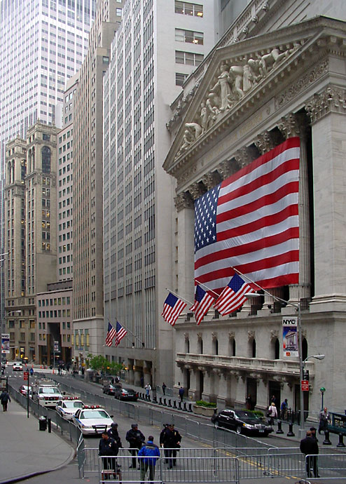 Die US-Börse im Sommer